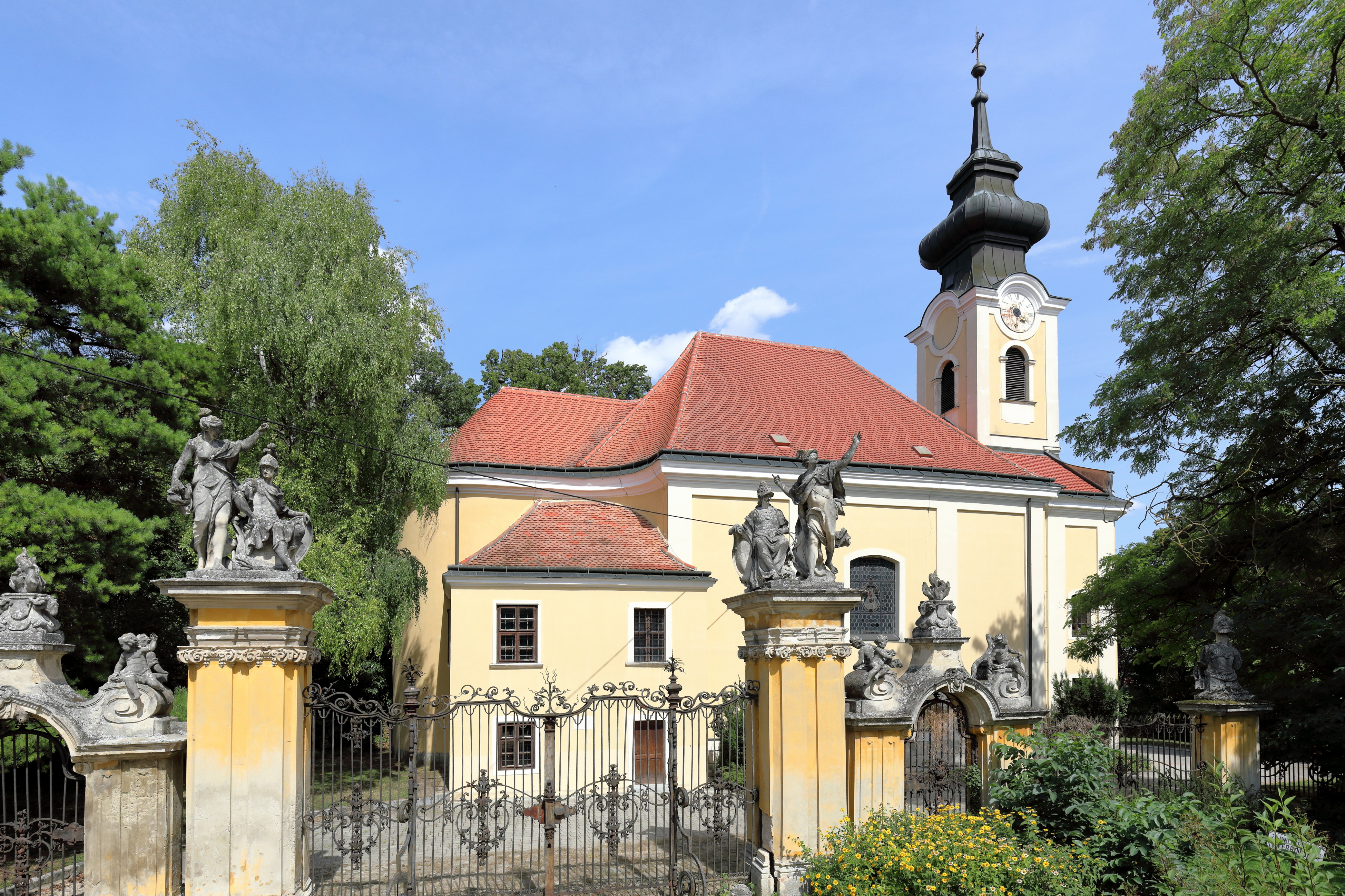 Westansicht der röm.-kath. Pfarrkirche hl. Andreas in der niederösterreichischen Marktgemeinde Ladendorf und davor die Toranlage des Schlosses.Der spätbarocke Sakralbau mit Fassadenturm wurde 1766 nach Plänen von Peter Mollner errichtet. Davor das Hauptportal des Schlosses aus dem 2. Viertel des 18. Jahrhunderts.